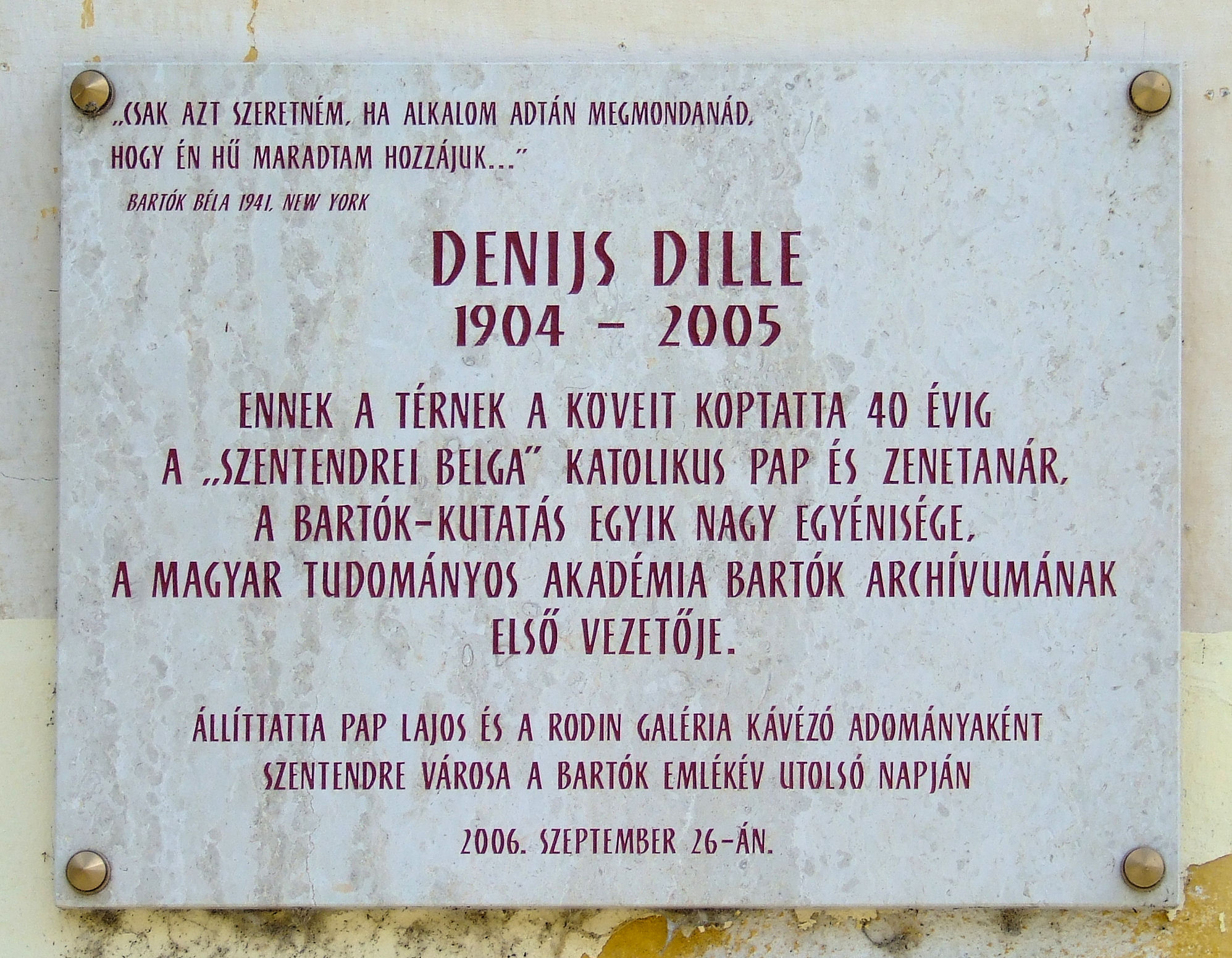 Denijs Dille emléktáblája Szentendrén, Bogdányi utca 23.